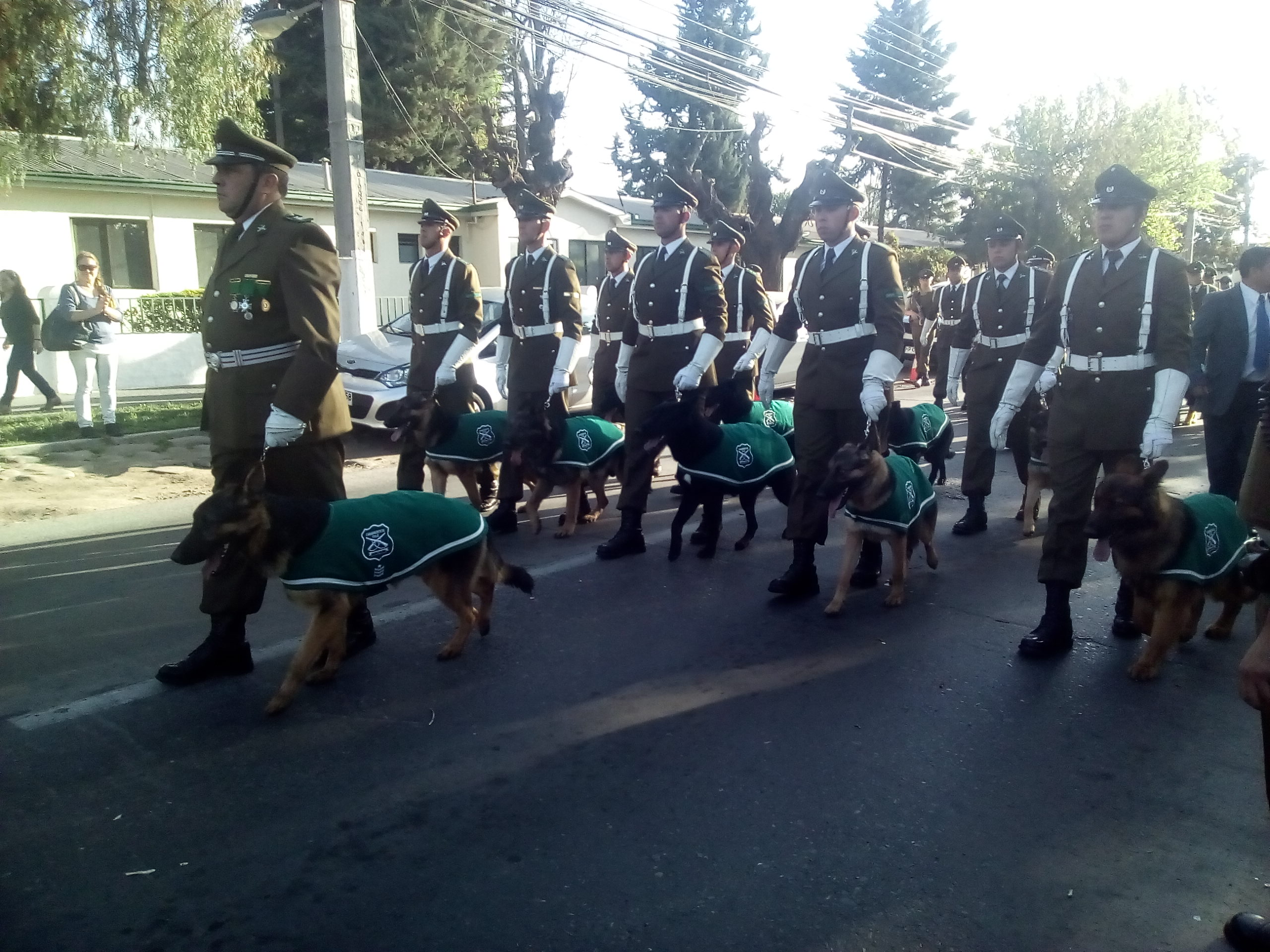 Carabineros de Chile es la fuerza policial de dicho pais.